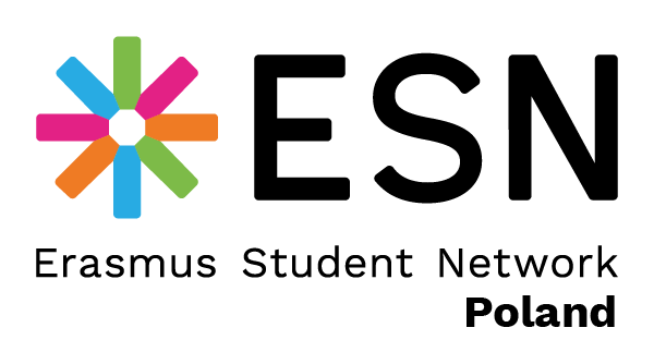 Publikacja na prośbę organizacji w celu ilustracji artykułu nowym logiem.